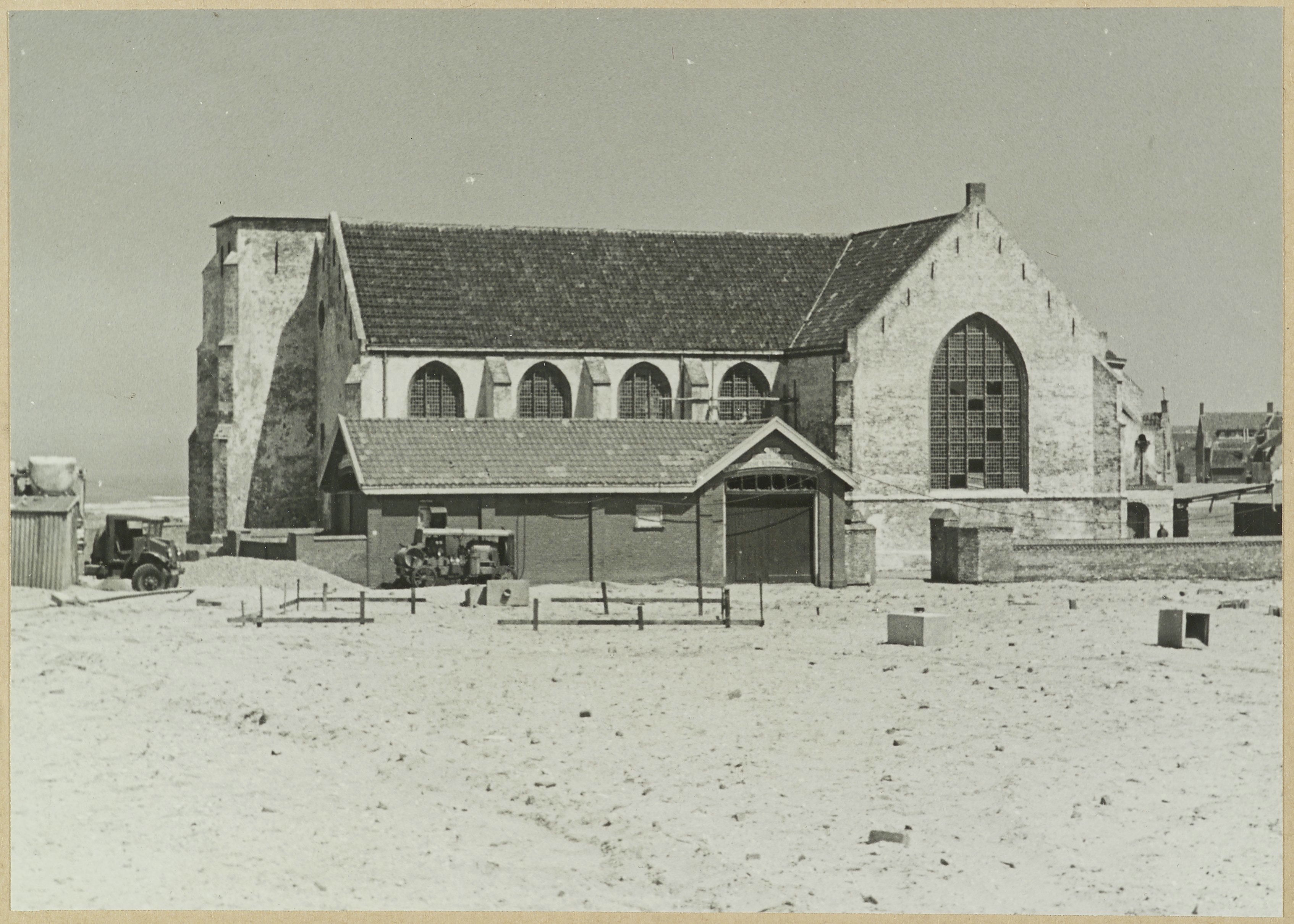 Oude kerk: Zicht vanuit het zuiden bovengedeelte toren is verwijderd (opmerking: Bijschrift: Opname uit fotoarchief Katwijk, fotohandel D. Kruyt)